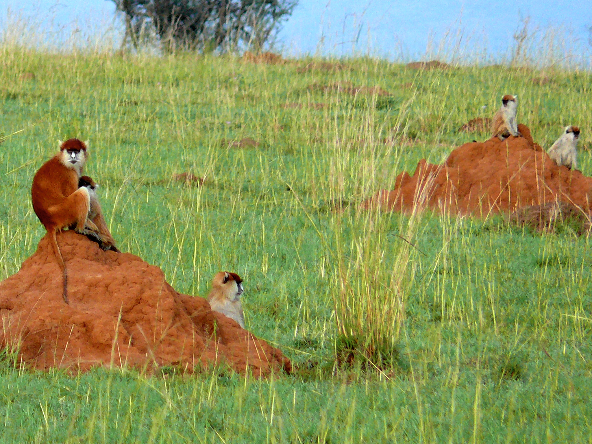 Murchison Falls NP, UGANDA